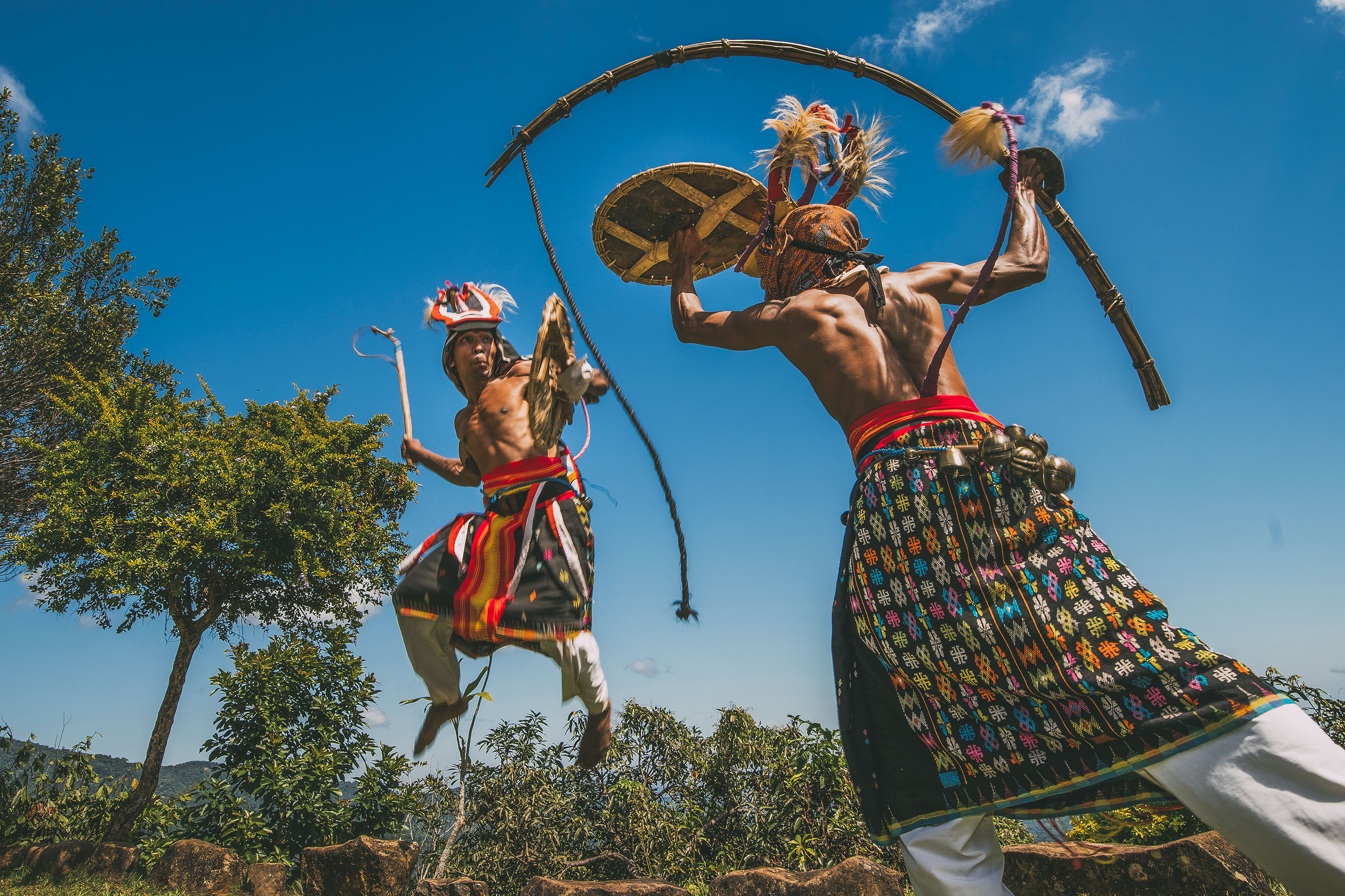 Tari Caci merupakan seni tari perang berasal dari Manggarai Barat, Flores, NTT. Yang di lengkapi perisai dan cambuk untuk menguji keberanian dan ketangkasan.